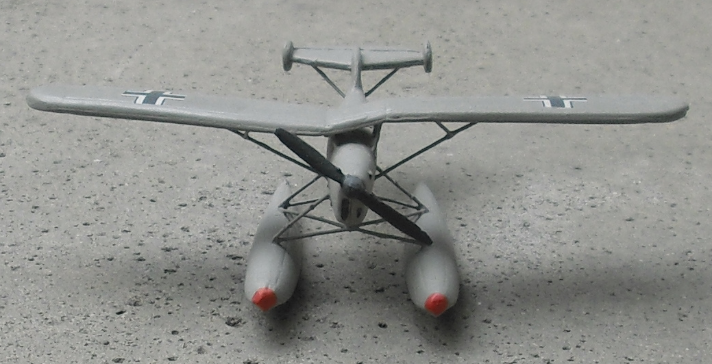 Modell der Arado 231 Vorderansicht mit charakeristischer Tragflächenform